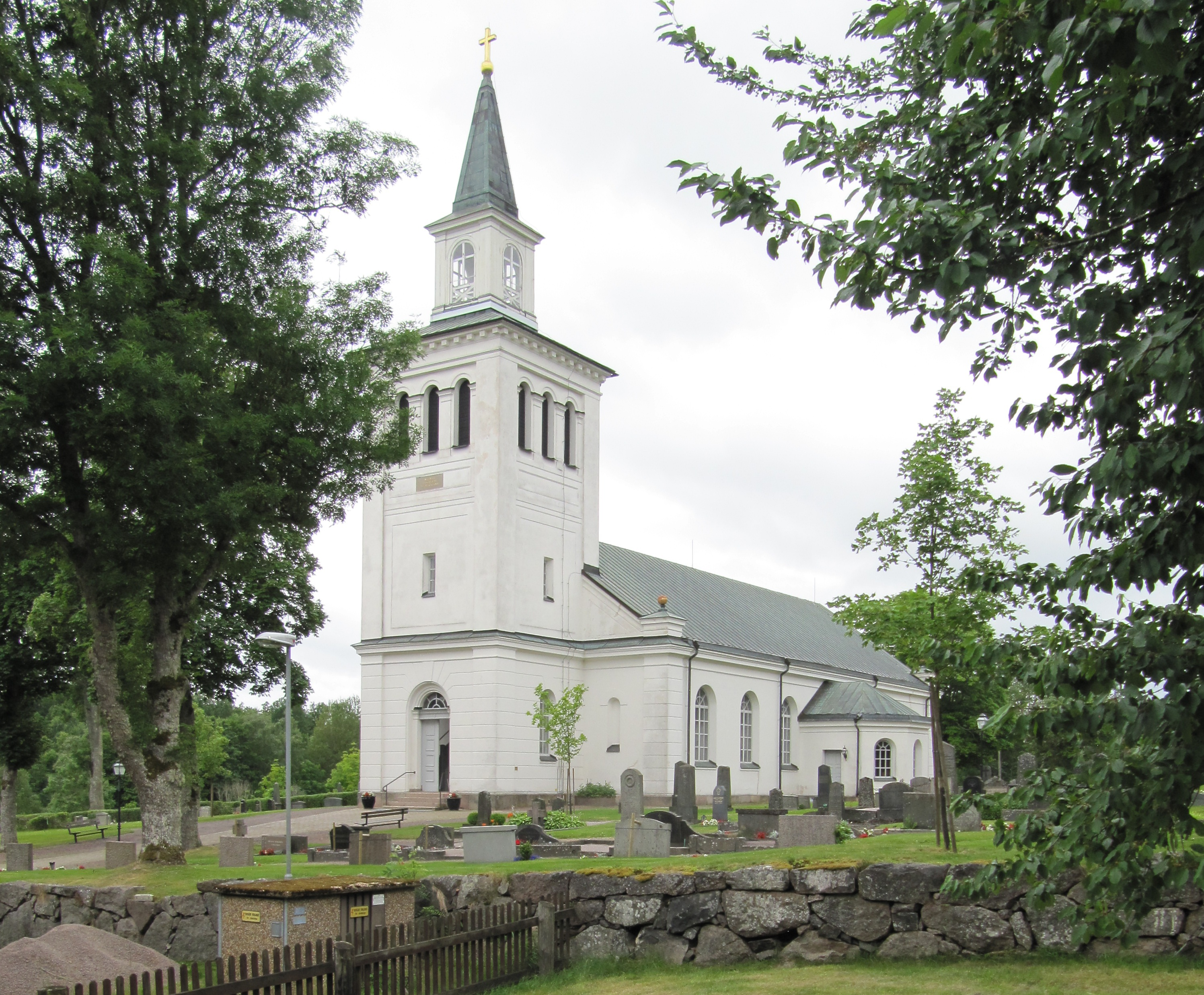 Lönneberga kyrka från nordost